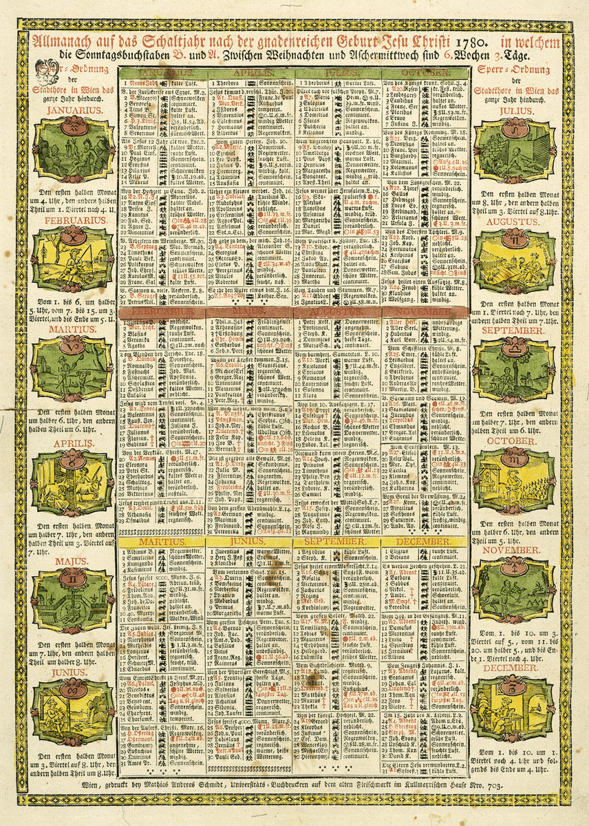 Almanach auf das Schaltjahr ... 1780, Wien, gedruckt bey Mathias Andreas Schmidt 1779